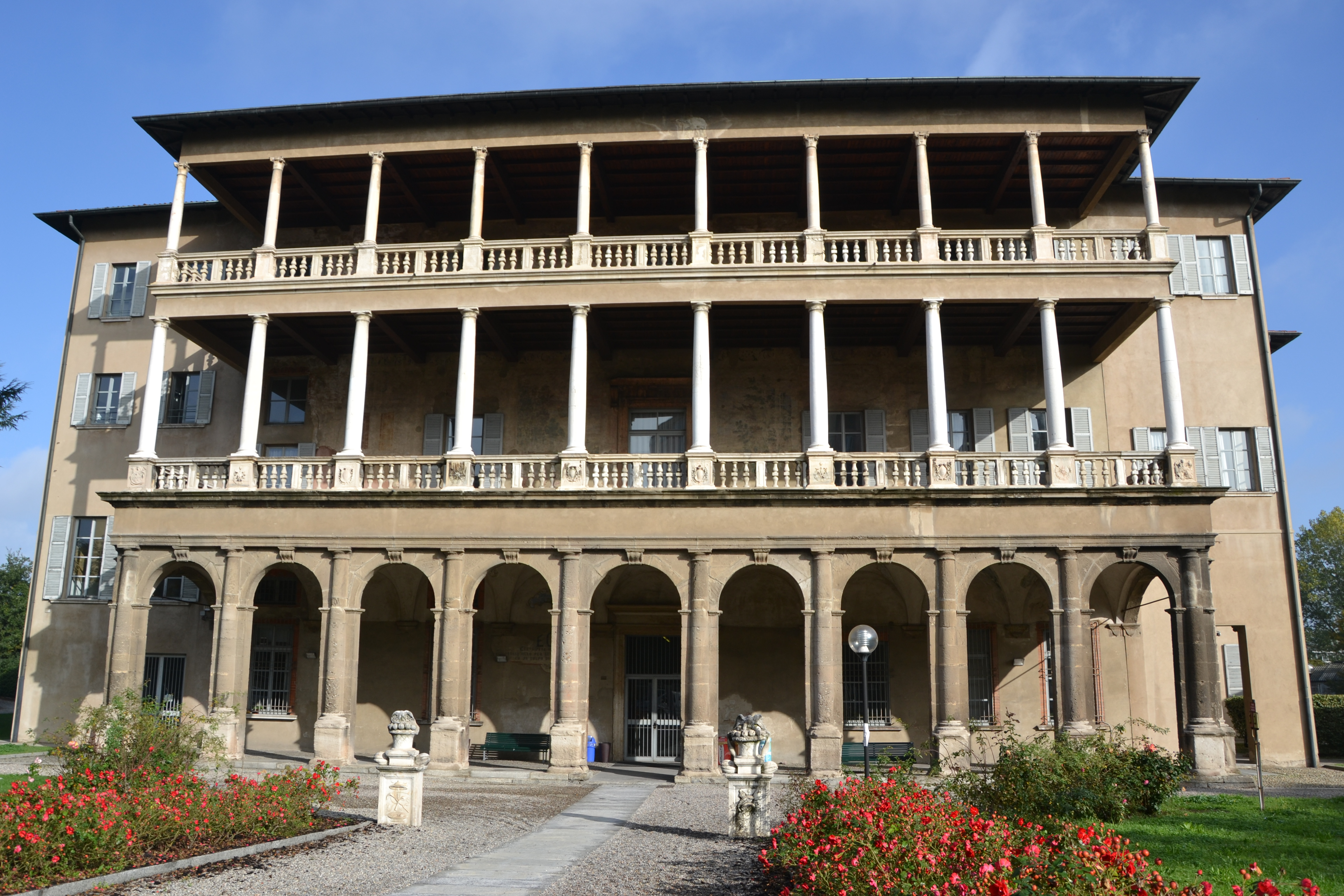 Villa Simonetta è una villa patrizia rinascimentale situata a Milano in via Stilicone 36, edificata alla fine del XV secolo Oggi la villa è di proprietà comunale